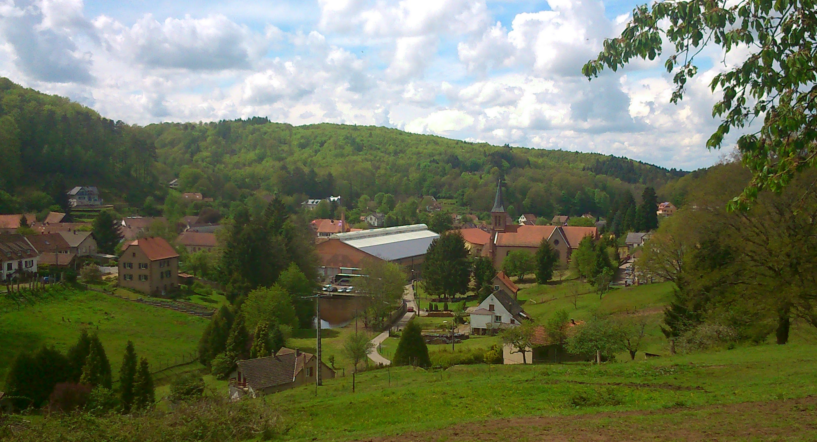 Vue du village de Meisenthal (Moselle)